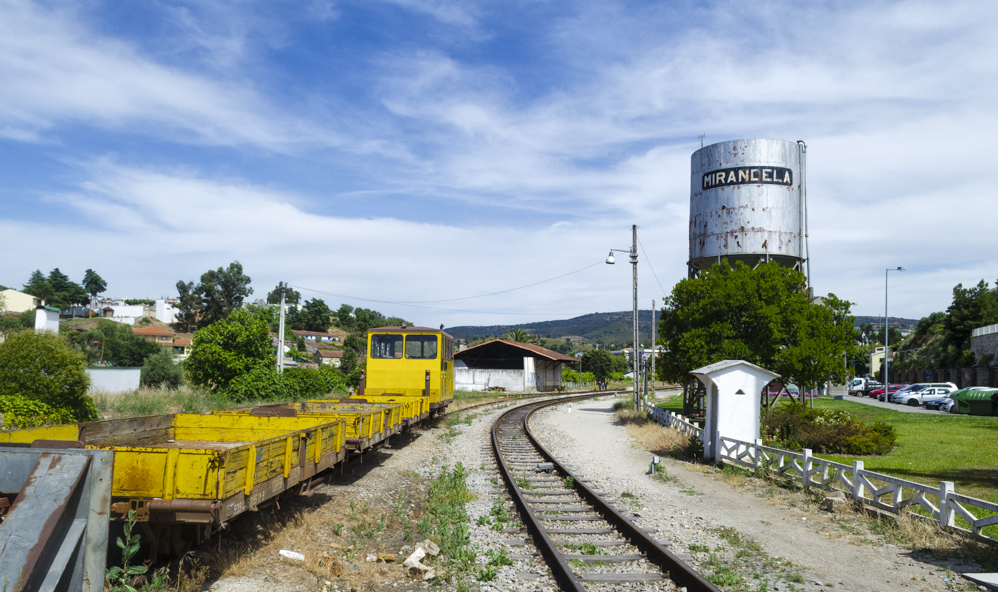 mirandela